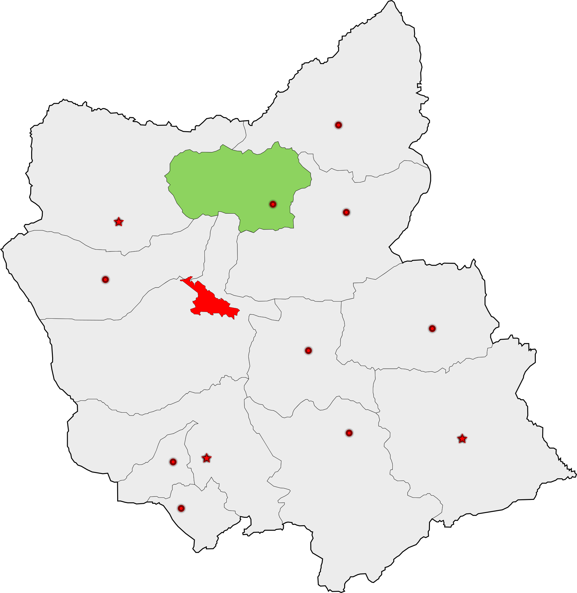 حوزهٔ انتخاباتی ورزقان برای انتخابات مجلس شورای اسلامی